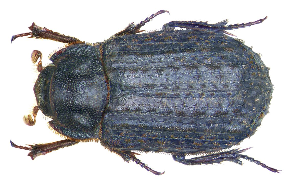 Familie: Trogidae Groesse: 5-8 mm Verbreitung: kosmopolitisch Ökologie: Entwicklung in Vogelnestern Fundort: Germania, Bayern, Oberfranken, Kulmbach leg. det. U.Schmidt, 1997 Photo: U.Schmidt, 2007